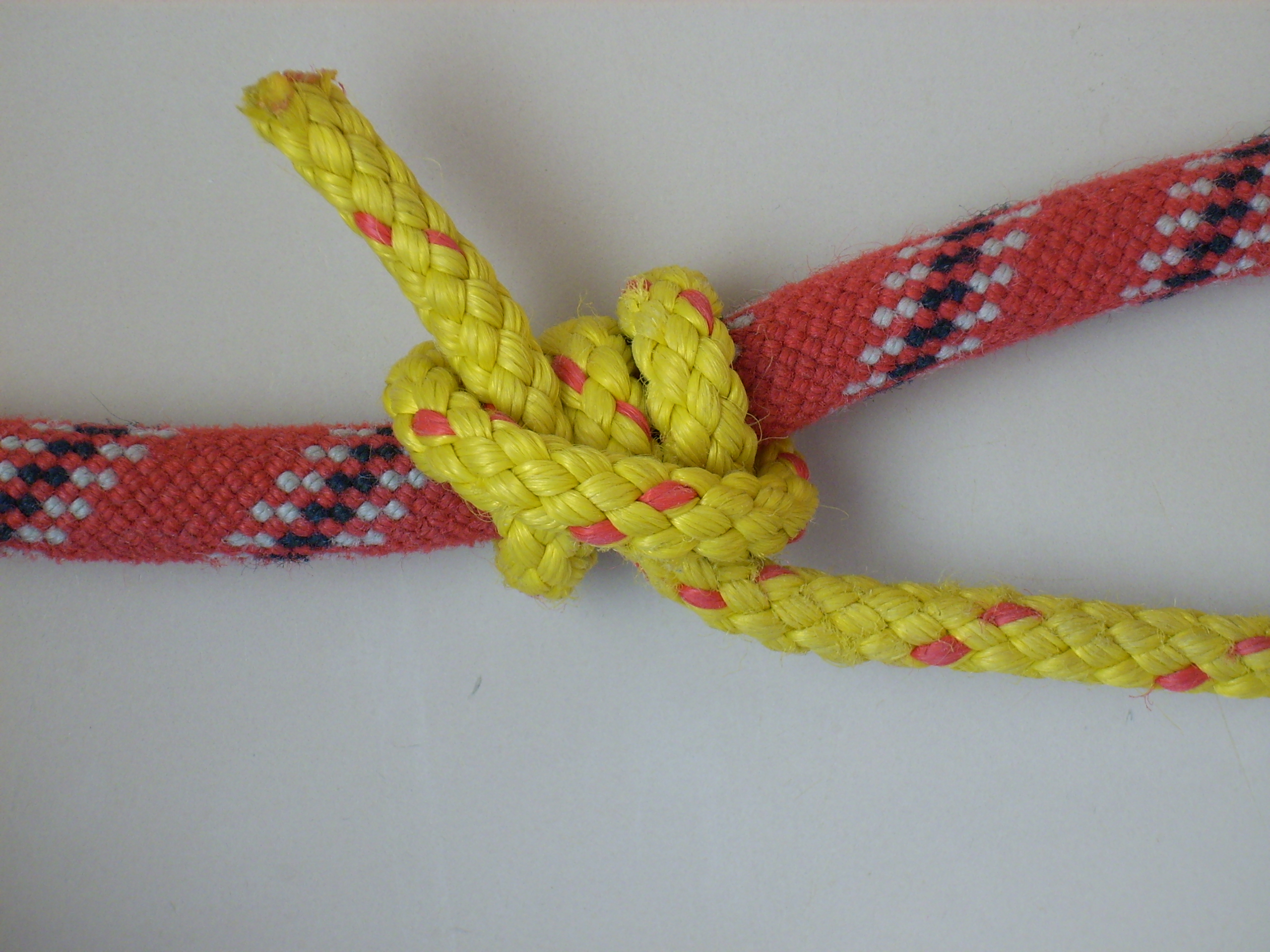 Stopperstek in Endform. Links an der Trosse ist der Schlepper, rechts an der Leine ist der Geschleppte.